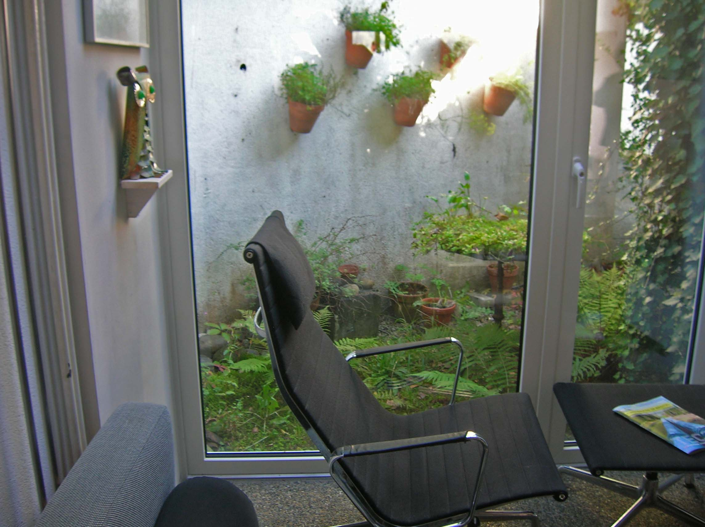 Halensiedlung, Innenhof